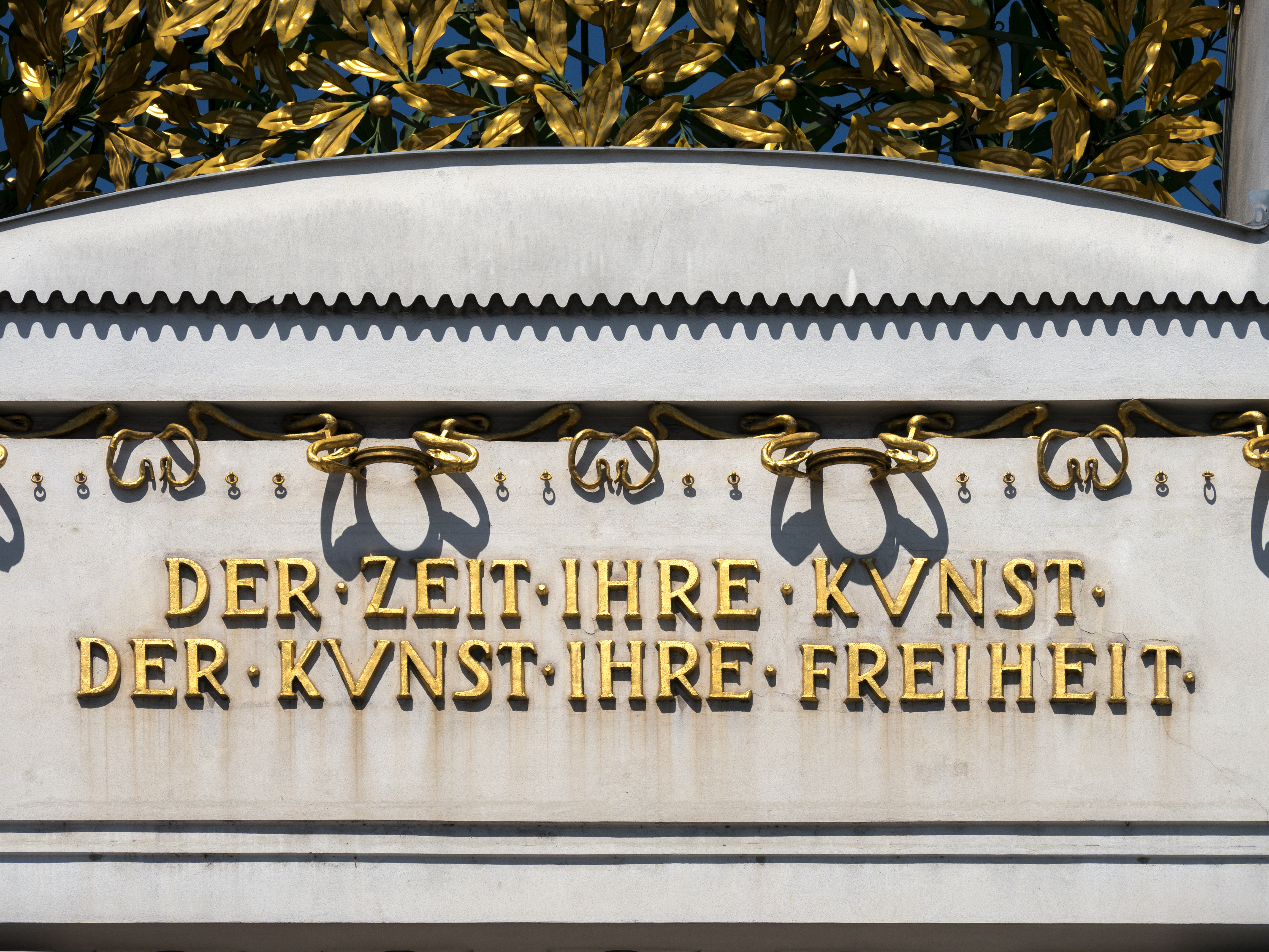 Secession Detail Gorgonen